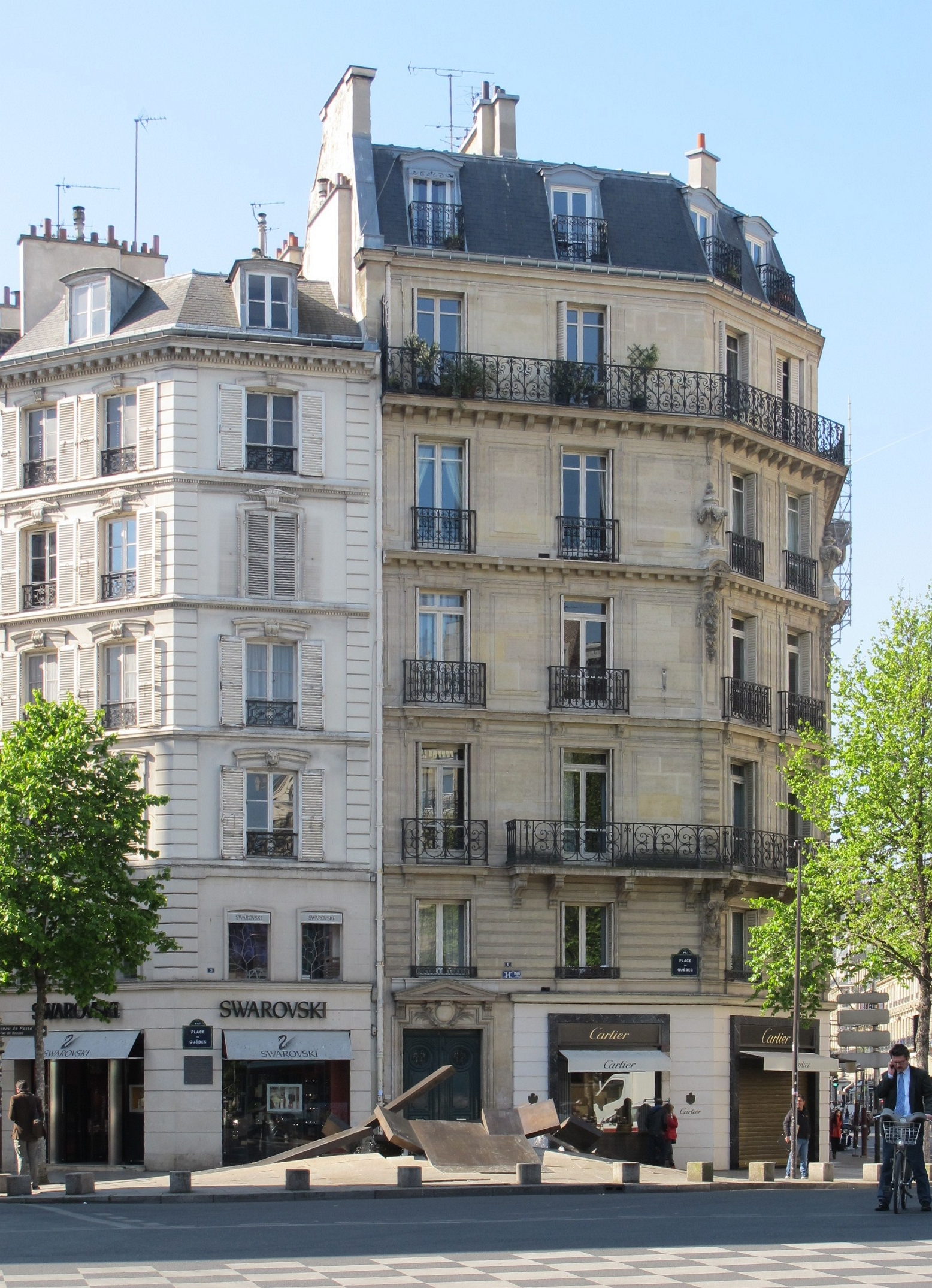 Place du Québec, Paris